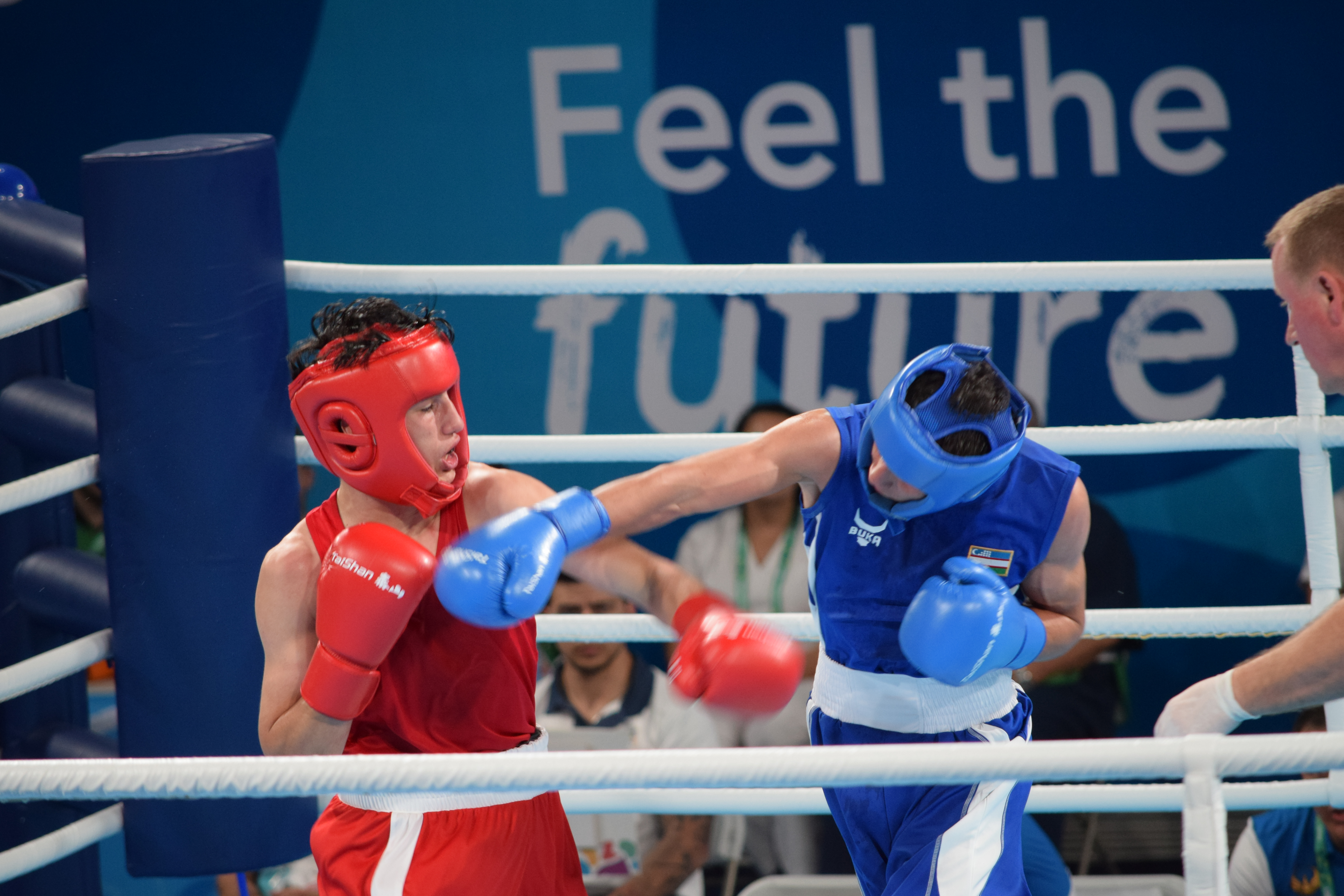 Semi-final de boxeo entre Argentina y Uzbekistan, durante los Juegos Olímpicos de la Juventud 2018 en Buenos Aires. Mirco Jehiel CUELLO y Abdumalik KHALOKOV.